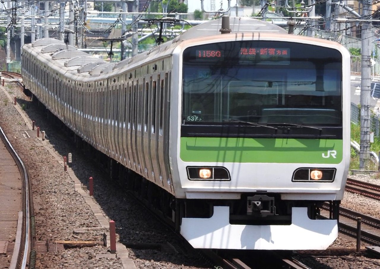 山手線E231系500番台トウ537編成。 田端駅～駒込駅間にて